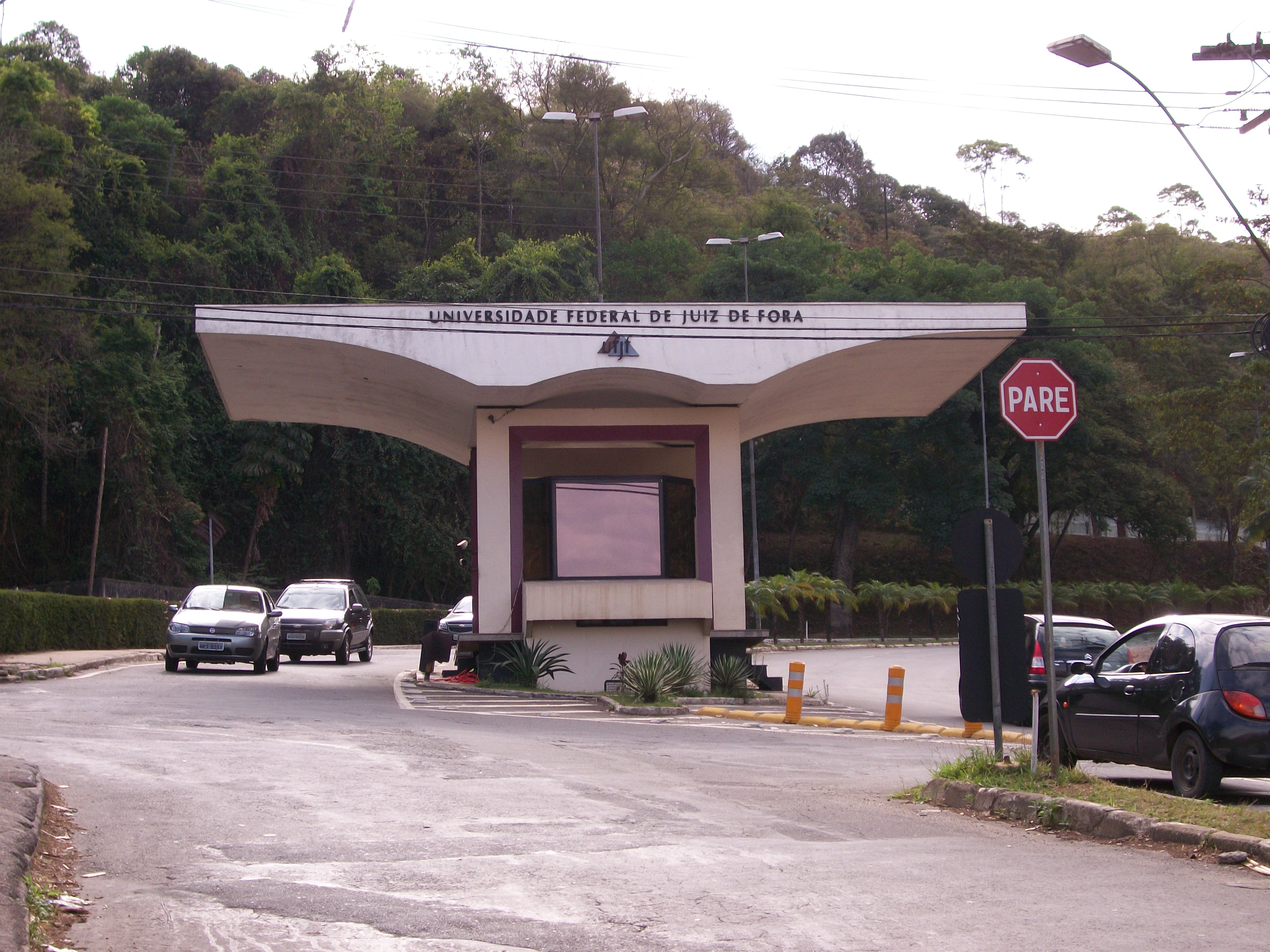 Entrada 2 da Universidade Federal de Juiz de Fora.jpg, em Juiz de Fora.